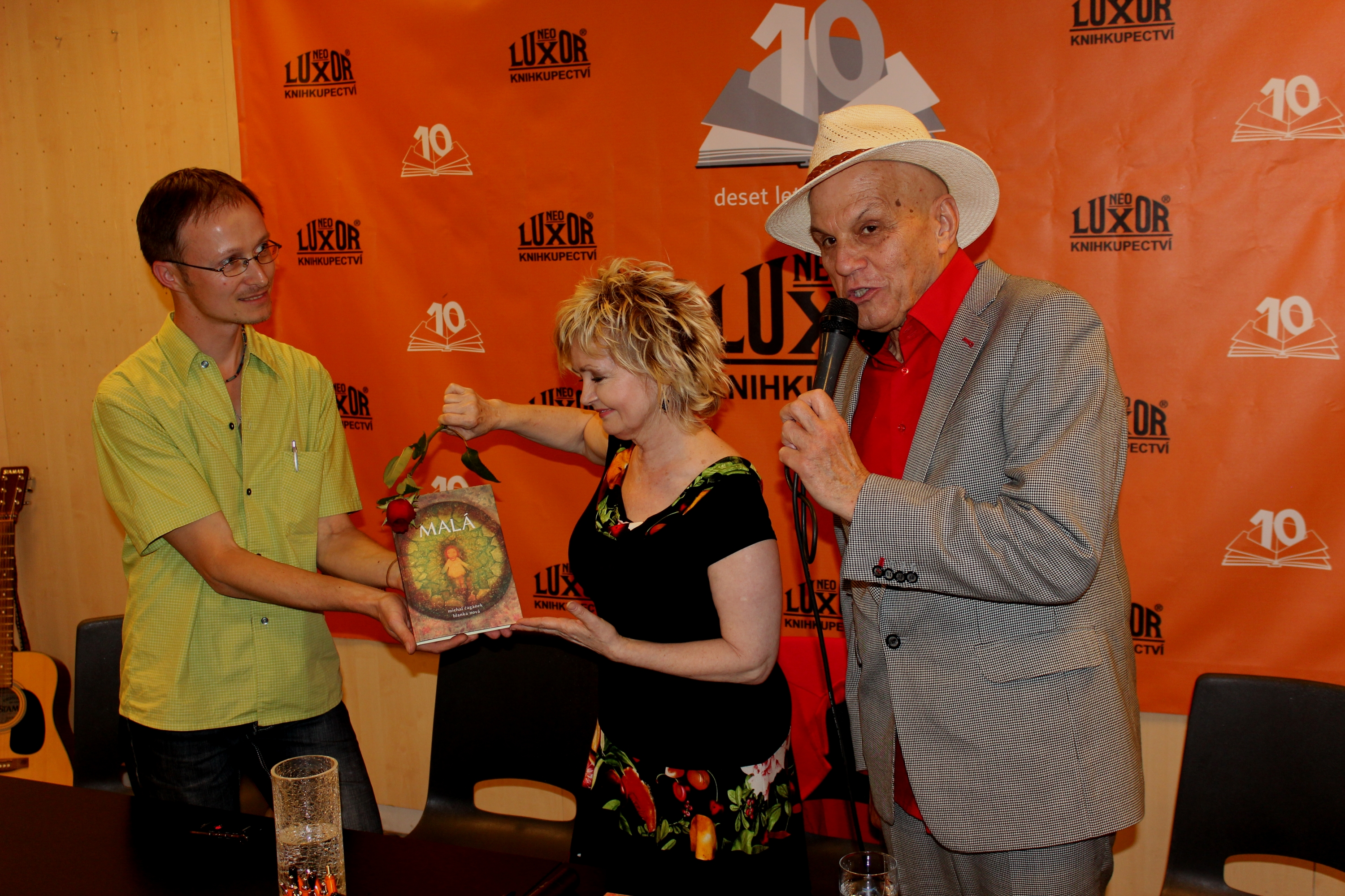 Křest knihy Michala Čagánka s názvem Malá, jenž proběhl 20. května 2013. Kmotry knihy byli Eva Hrušková a Jan Přeučil.